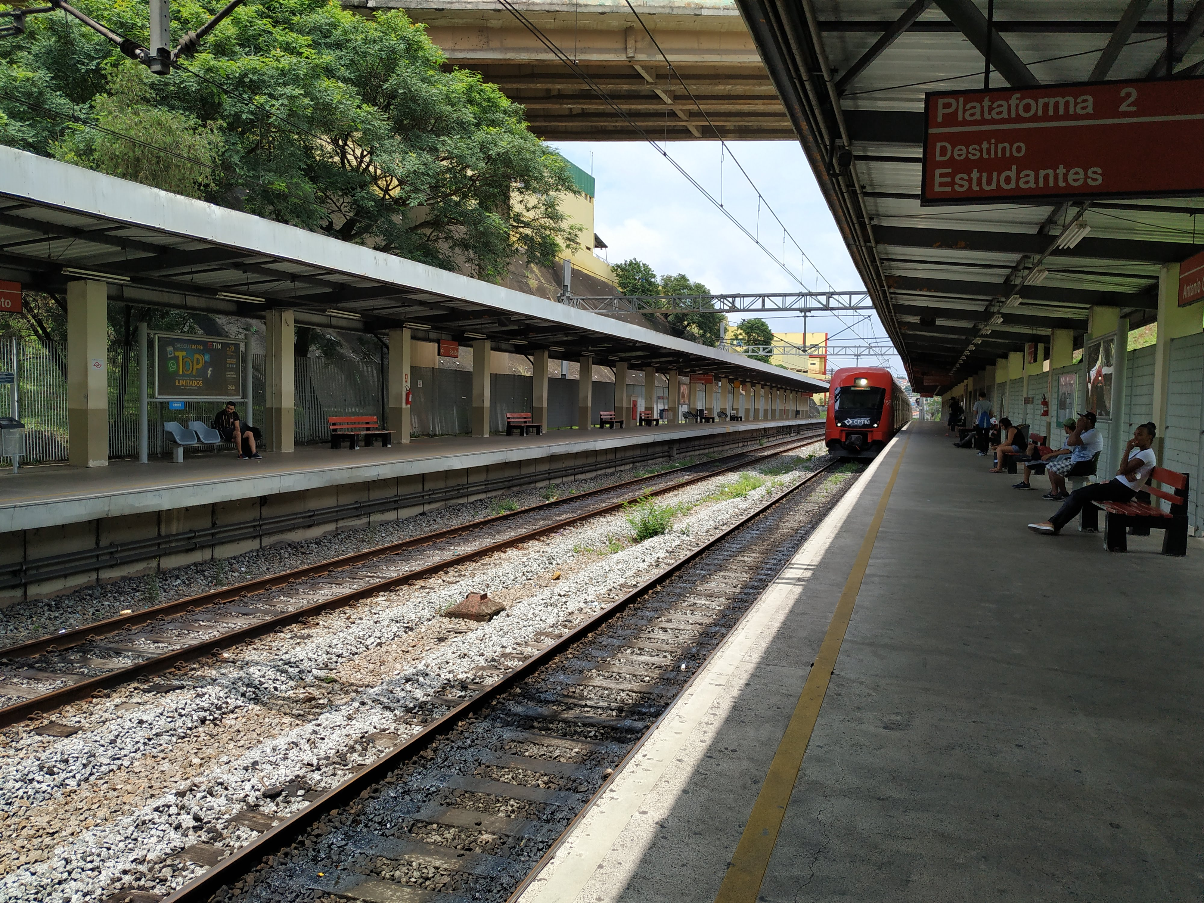 Estação Gianetti, em Ferraz de Vasconcelos.